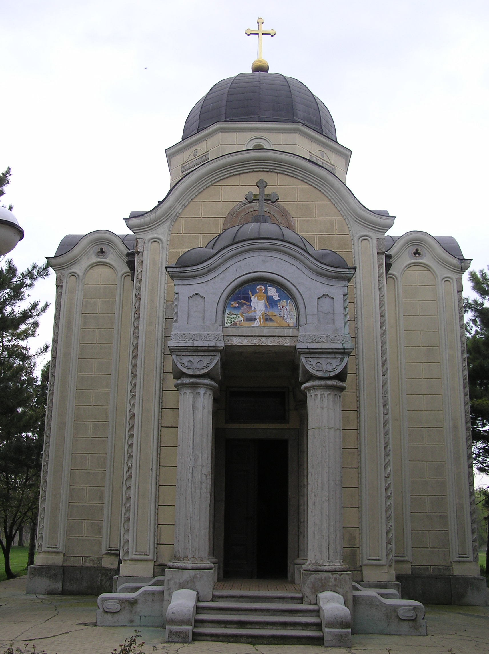 Капела Богдана Дунђерског код Бечеја (комплекс дворца „Фантаст")